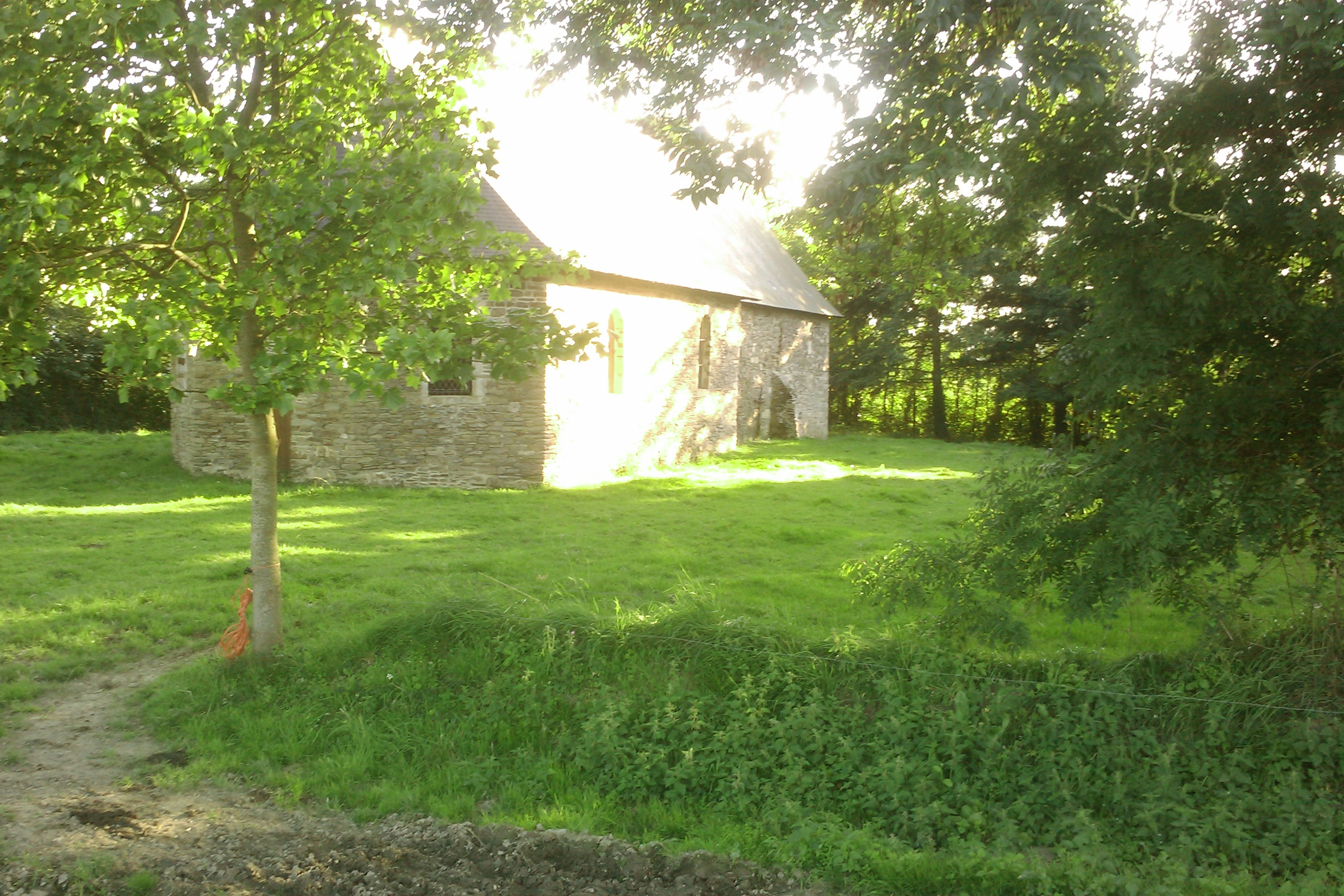 chapelle de Saint-Quentin d'Elle (ratachée à Bérigny)